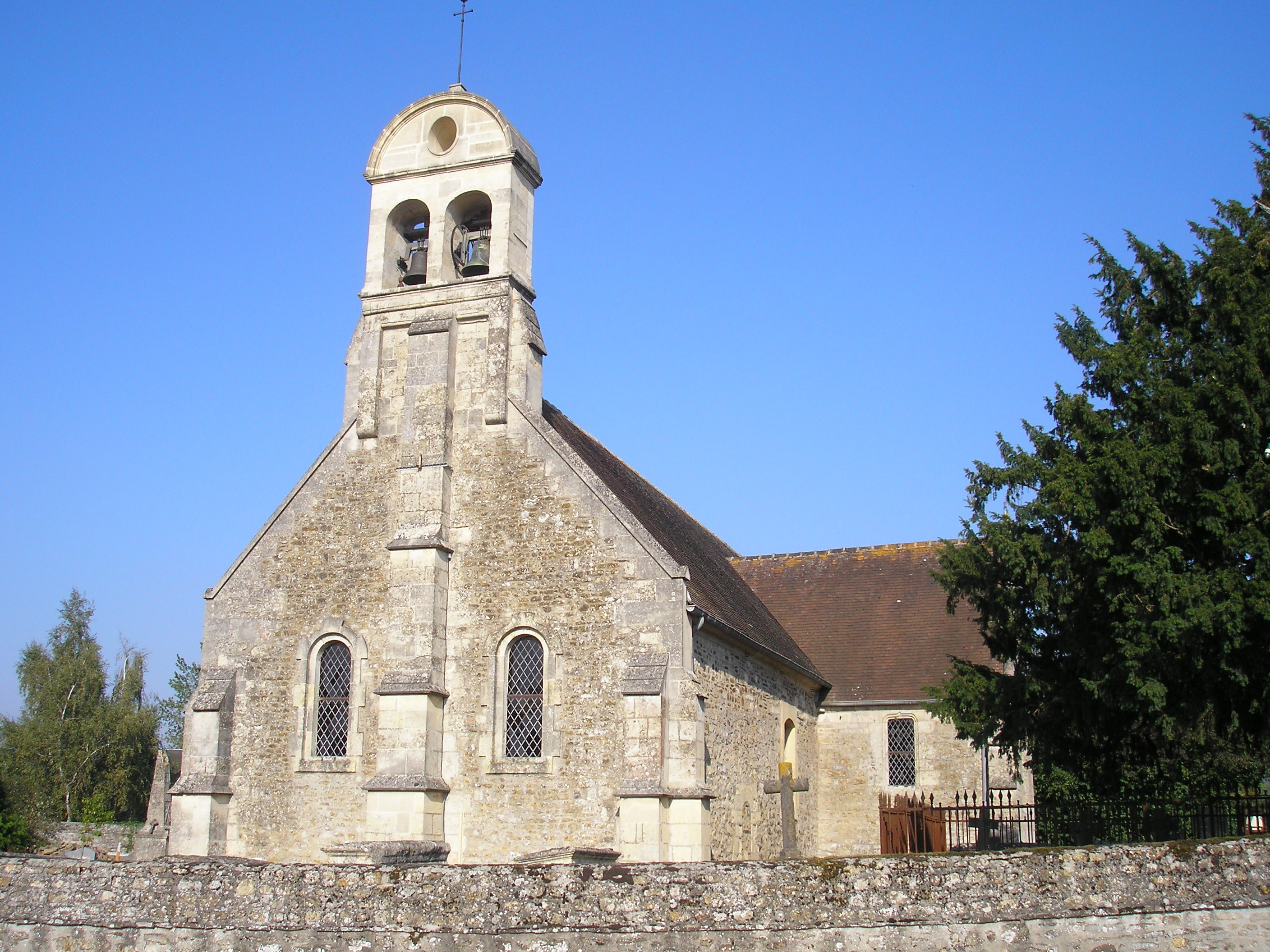 Gavrus (Normandie, France). L'église Saint-Aubin et son clocher-peigne (campenard).